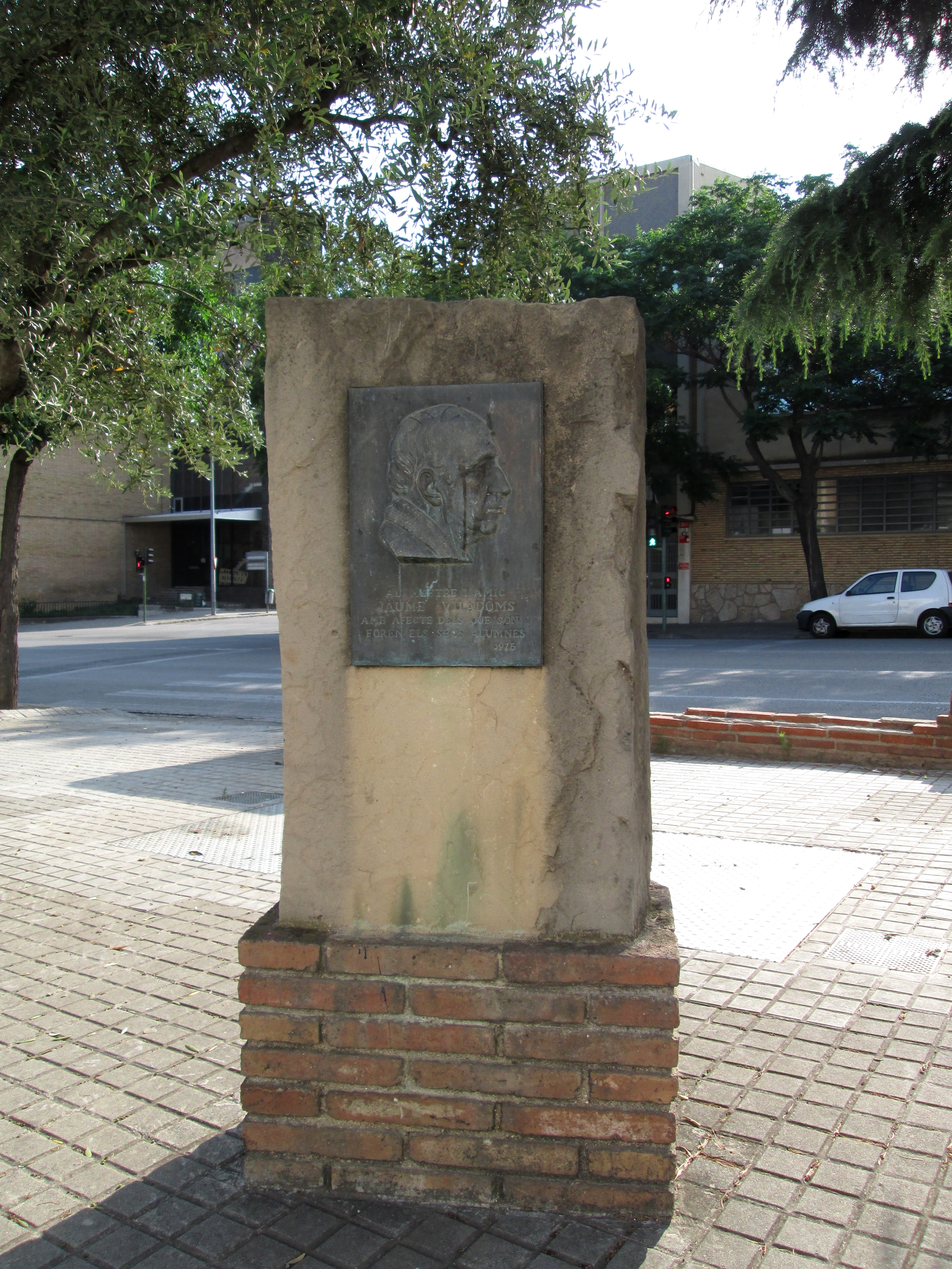 Monumento a Jaume Viladoms, obra de 1975 del escultor Adolf Salanguera, situado en el Pso. de Can Feu / C. Cèsar Torras, de Sabadell, Barcelona (España).